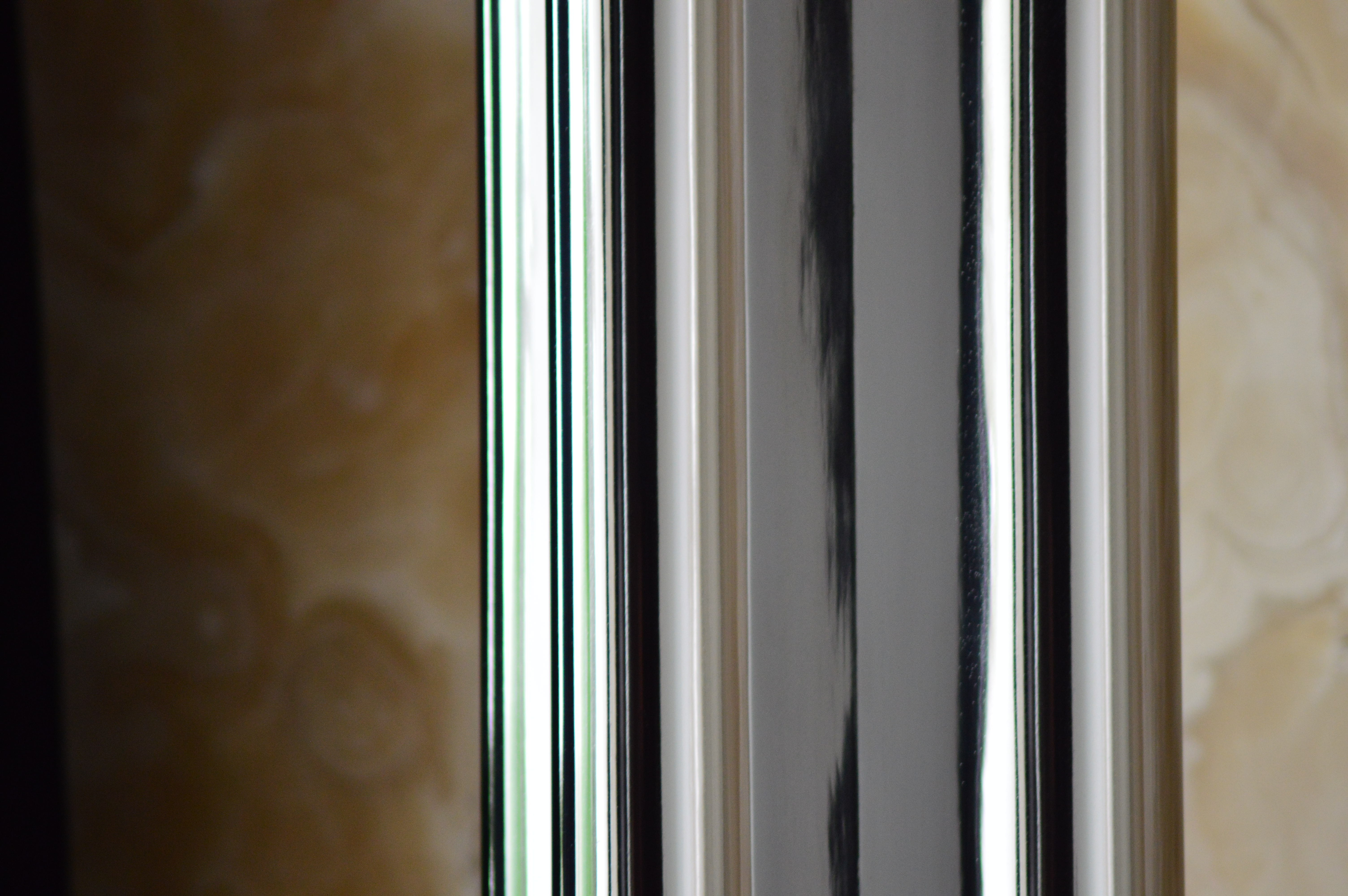 interiér Vila Tugendhat